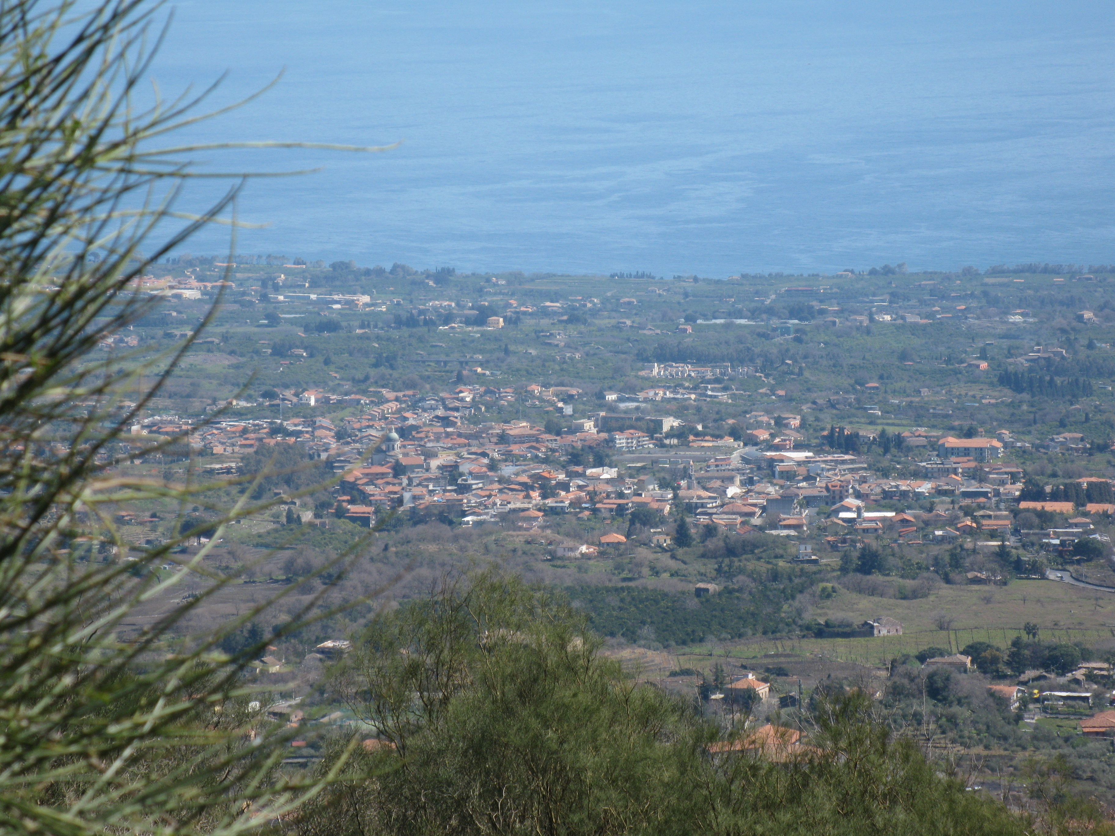 Panorama di Santa Venerina (CT) - Foto D. Pennisi